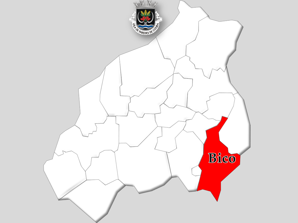 Censos 1864/2011